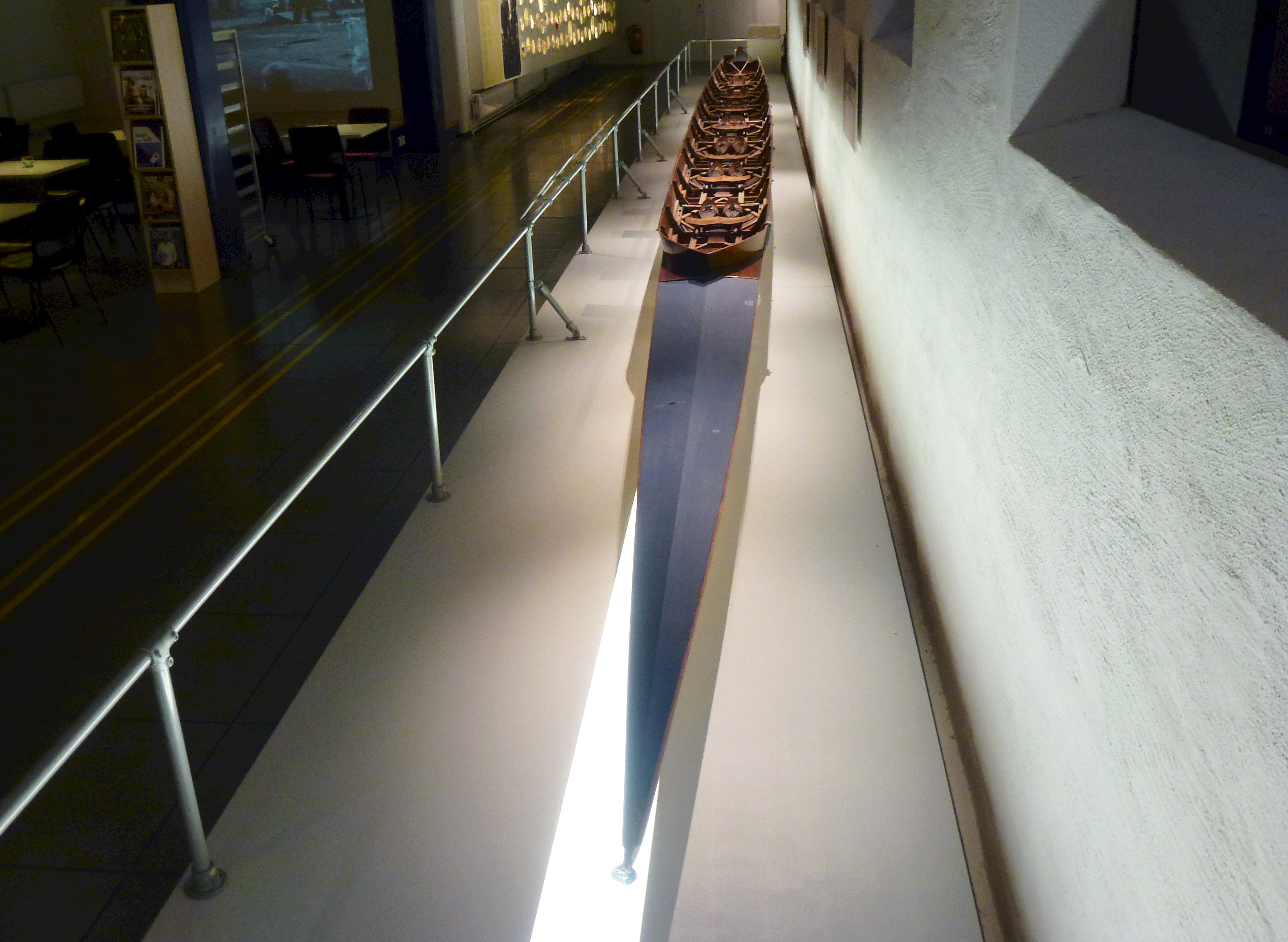 Sommarolympiaden i Stockholm 1912, vinnarbåten i klass utriggade åttor, Leander Rowing Club